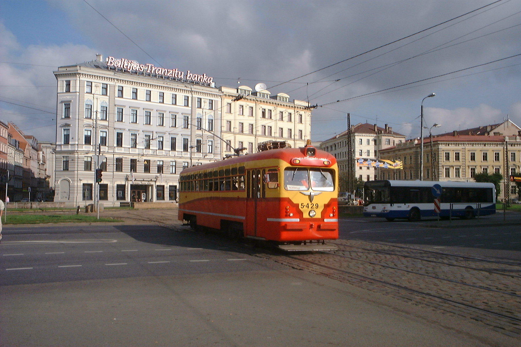 Electric trams in Riga, Latvia